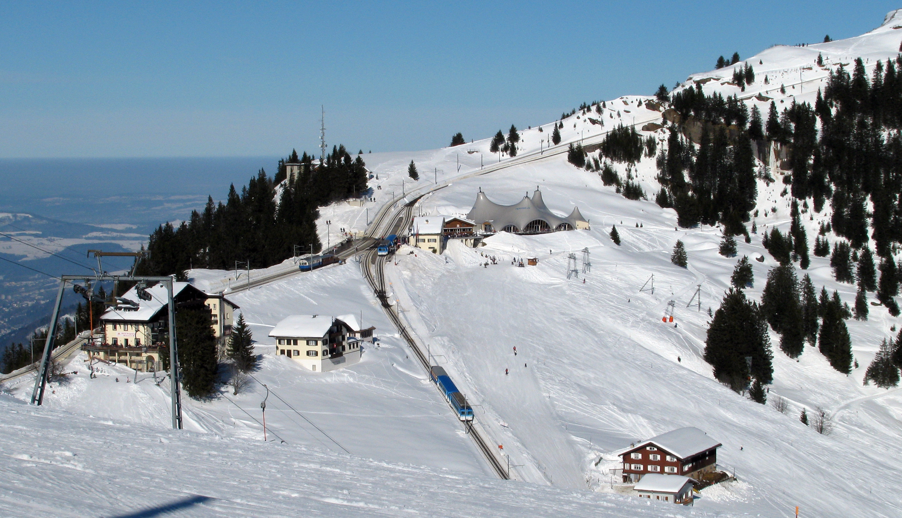 Rigi Bahnen Vitznau-Rigi-Bahn (left) and Arth-Rigi-Bahn (right), station Rigi Staffel